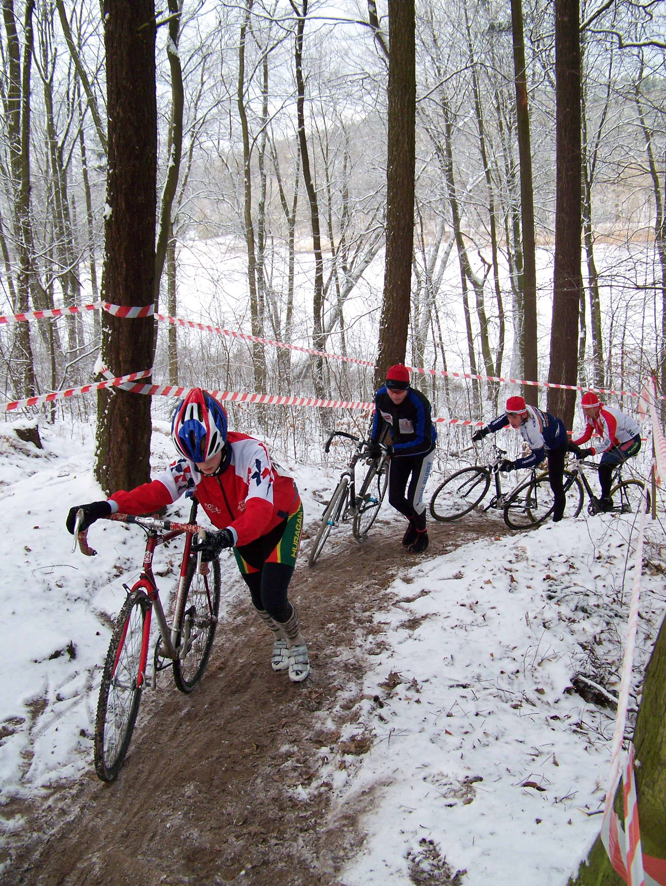 Międzynarodowe Zawody w Kolarstwie Przełajowym Bieganów 3-4.01.2009